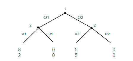 La imagen representa un árbol de decisión conformado por dos jugadores, en el se pueden observar las opciones que tiene cada uno de ellso